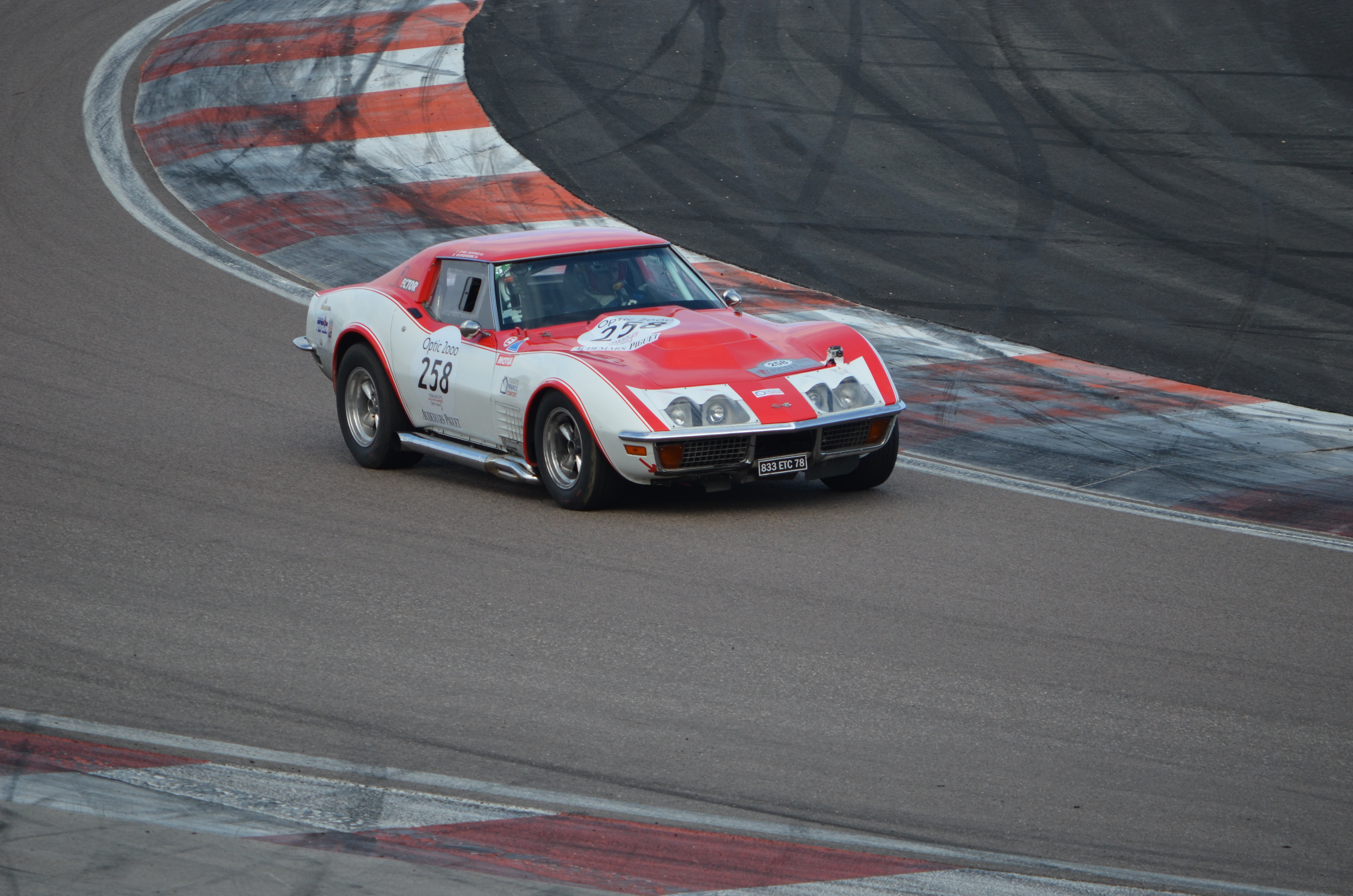 Chevrolet Corvette C3, numéro 258, Tour Auto 2012, étape sur le Circuit de Prenois.